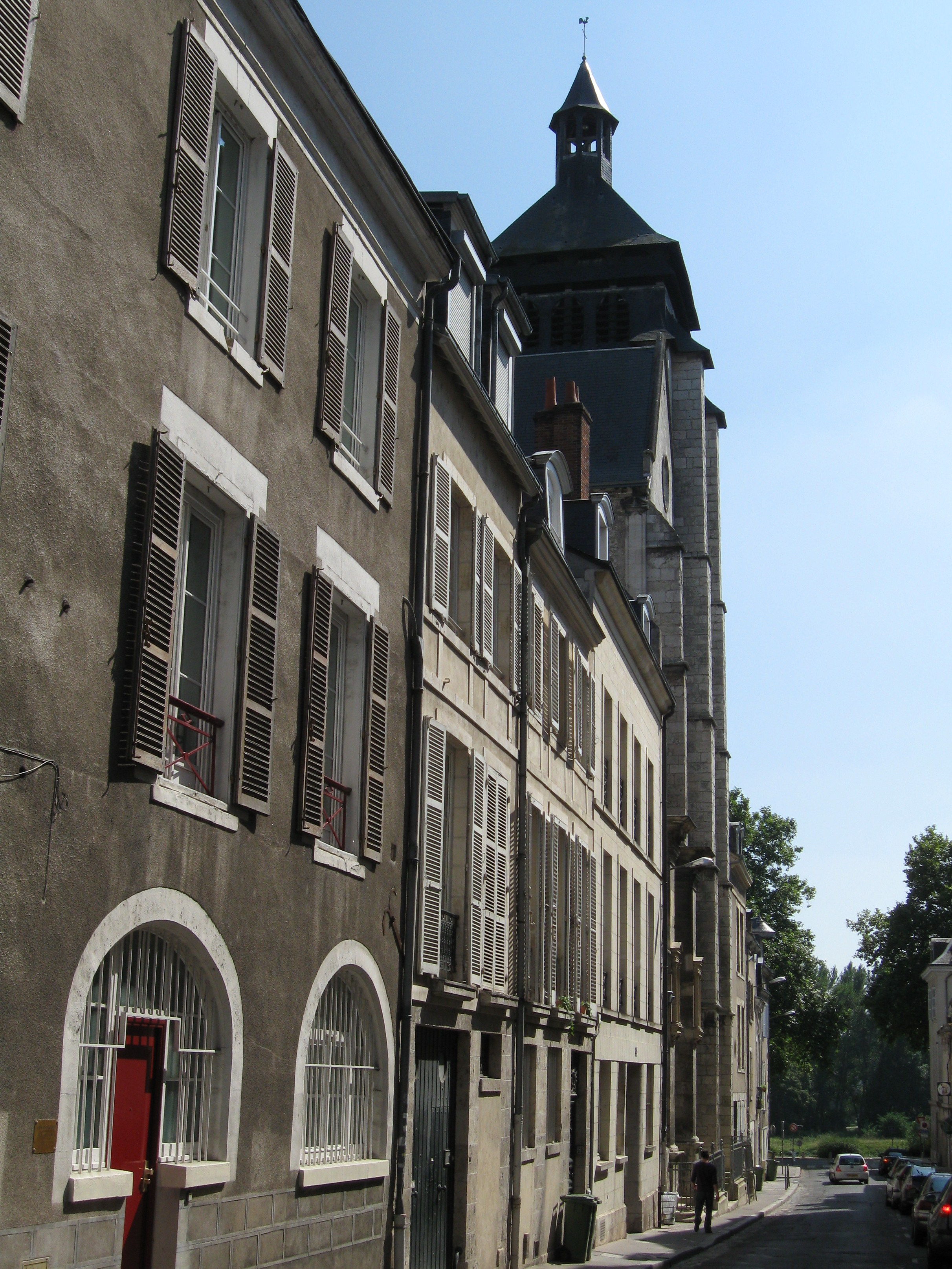 Église et rue Notre-Dame de Recouvrance, Orléans, Loiret, France, Orléans, Loiret, France